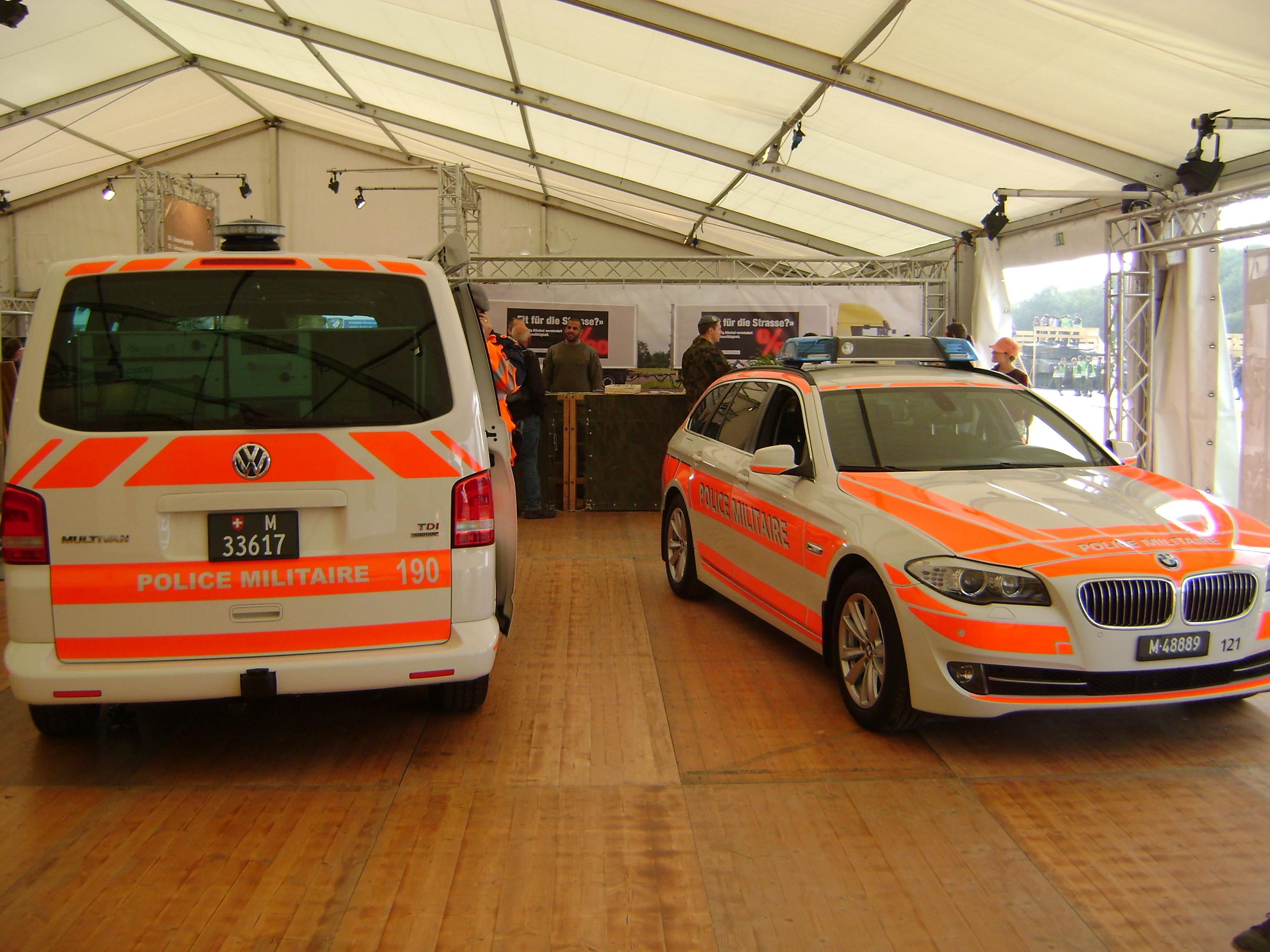 Militärpolizeifahrzeuge. Air14 : 100 Jahren Schweizer Luftwaffe, Jubiläums Flugtag in Militärflugplatz Payerne.